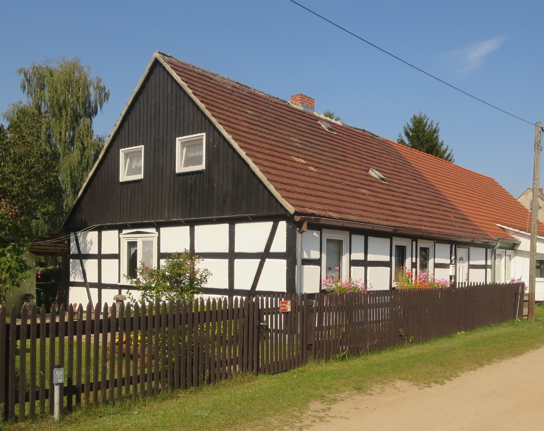 Bebersee, Bebersee 1